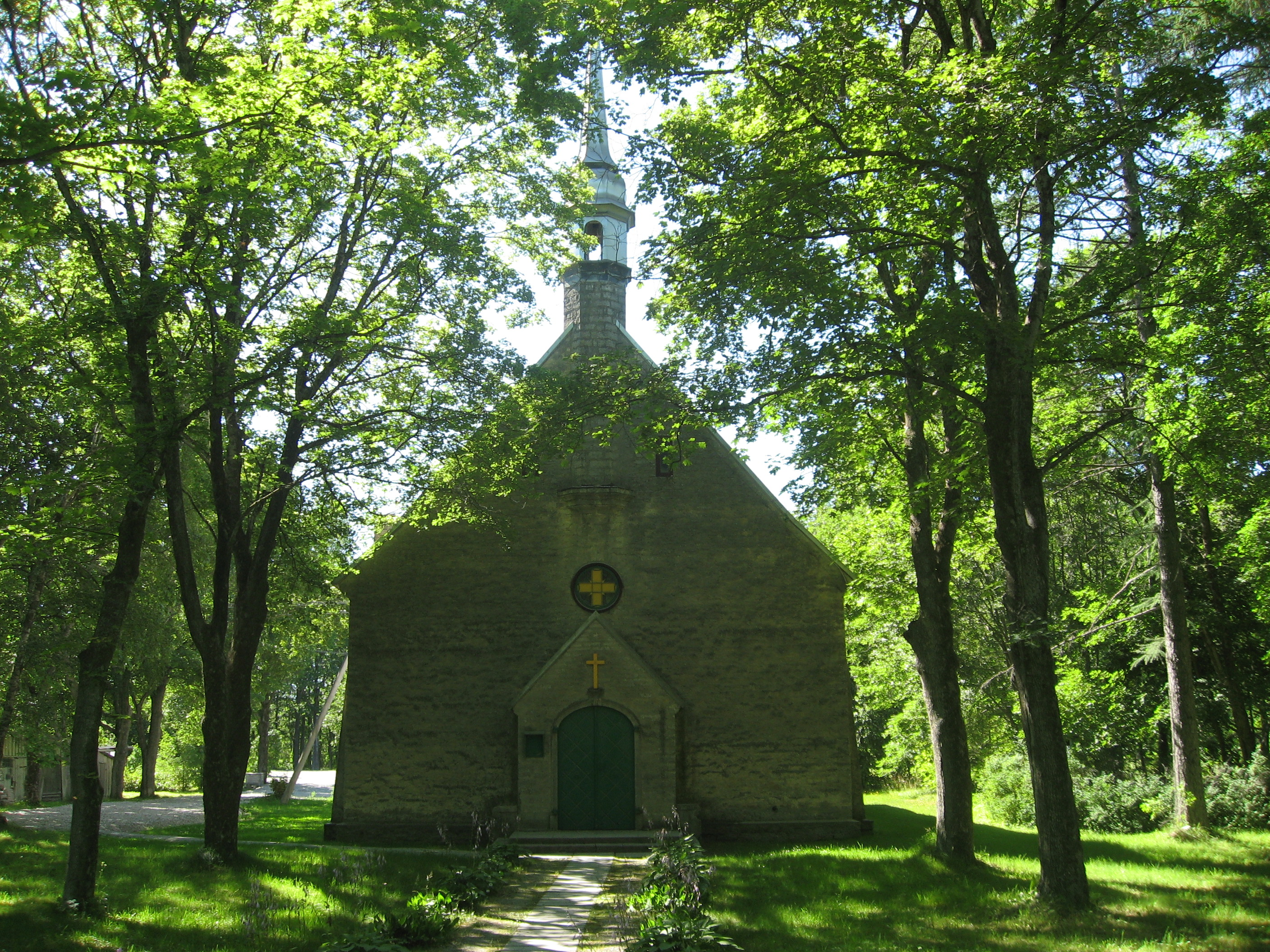 Kunda, kostel